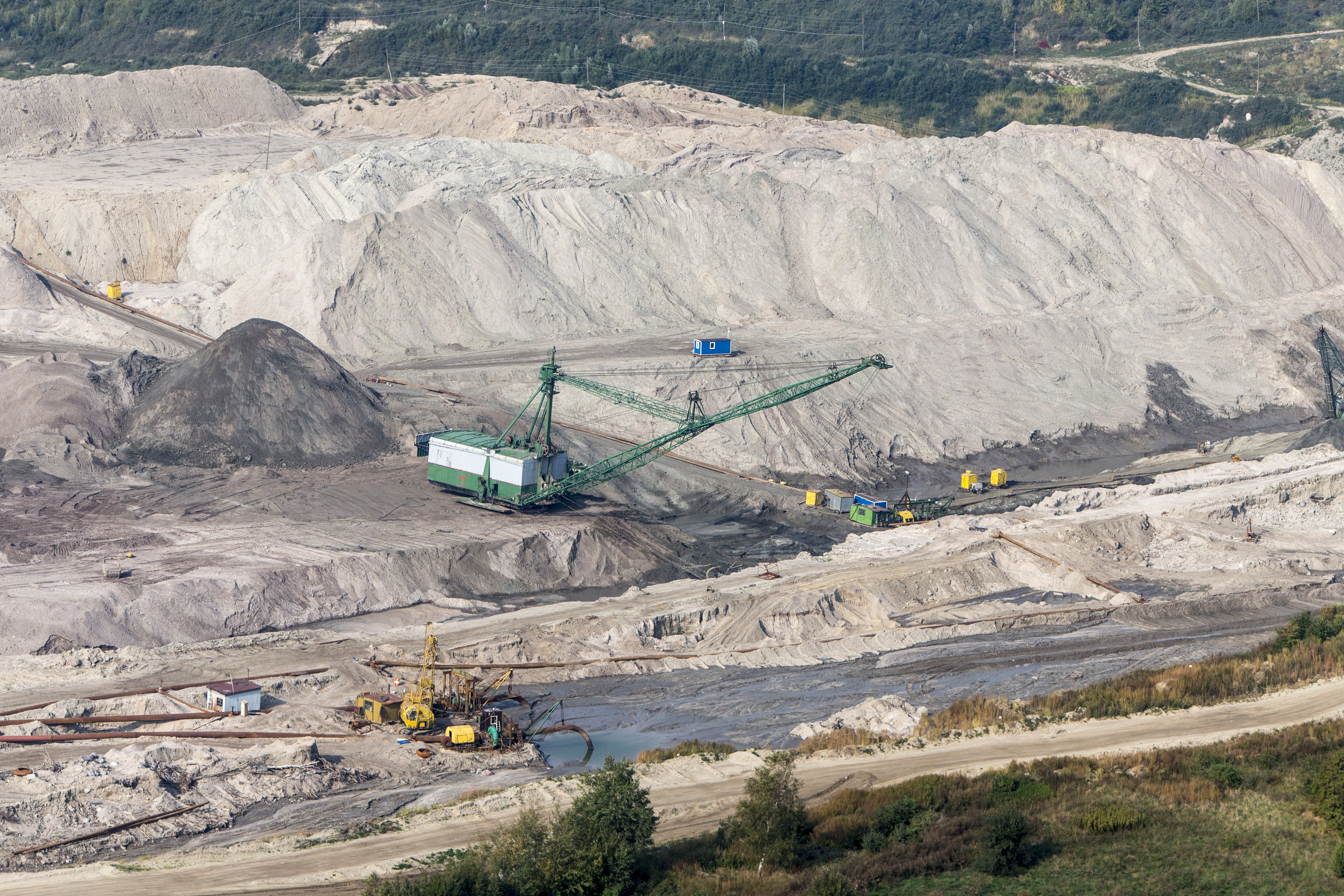 Вскрышной шагающий экскаватор-драглайн НКМЗ ЭШ-11-70 работает на Приморском карьере Калининградского янтарного комбината в посёлке Янтарный. Обозначение: 11 м3 - объём ковша, 70 м - длина стрелы.